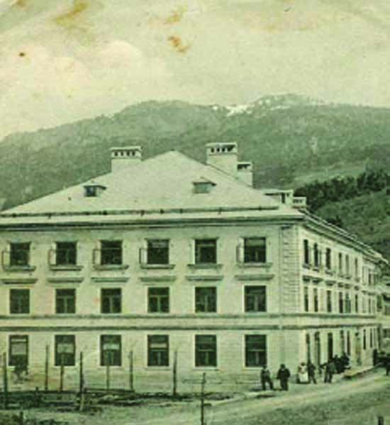 Rizzi-Kaserne in Kötschach